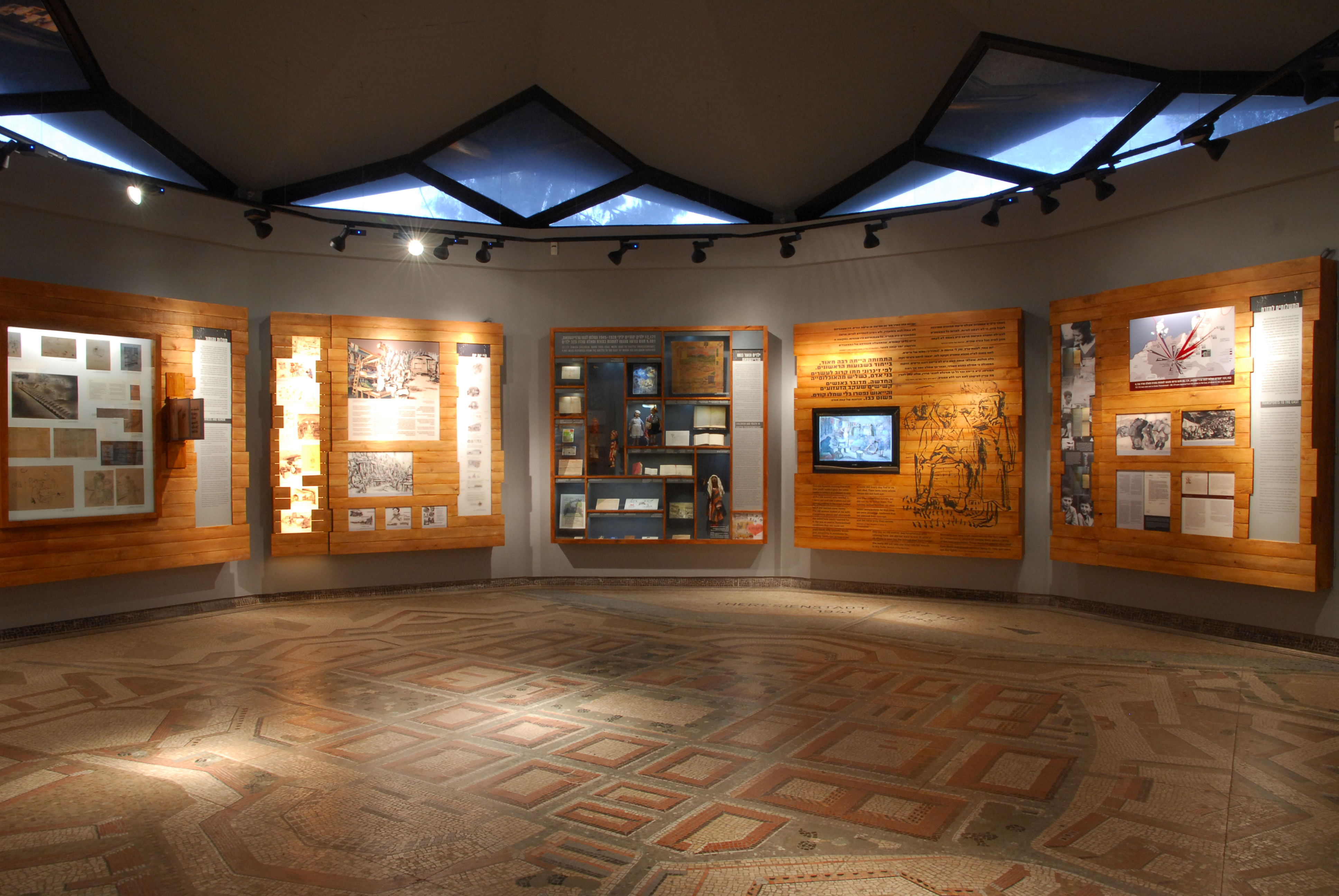 מבט על תערוכת הקבע טרזיינשטט 1941-1945